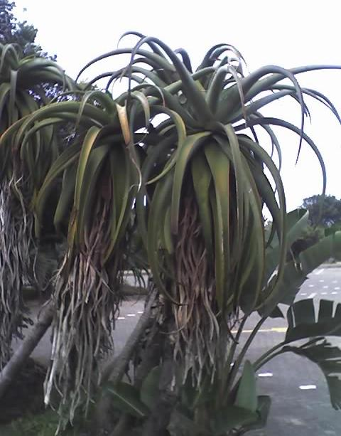 Aloe thraskii